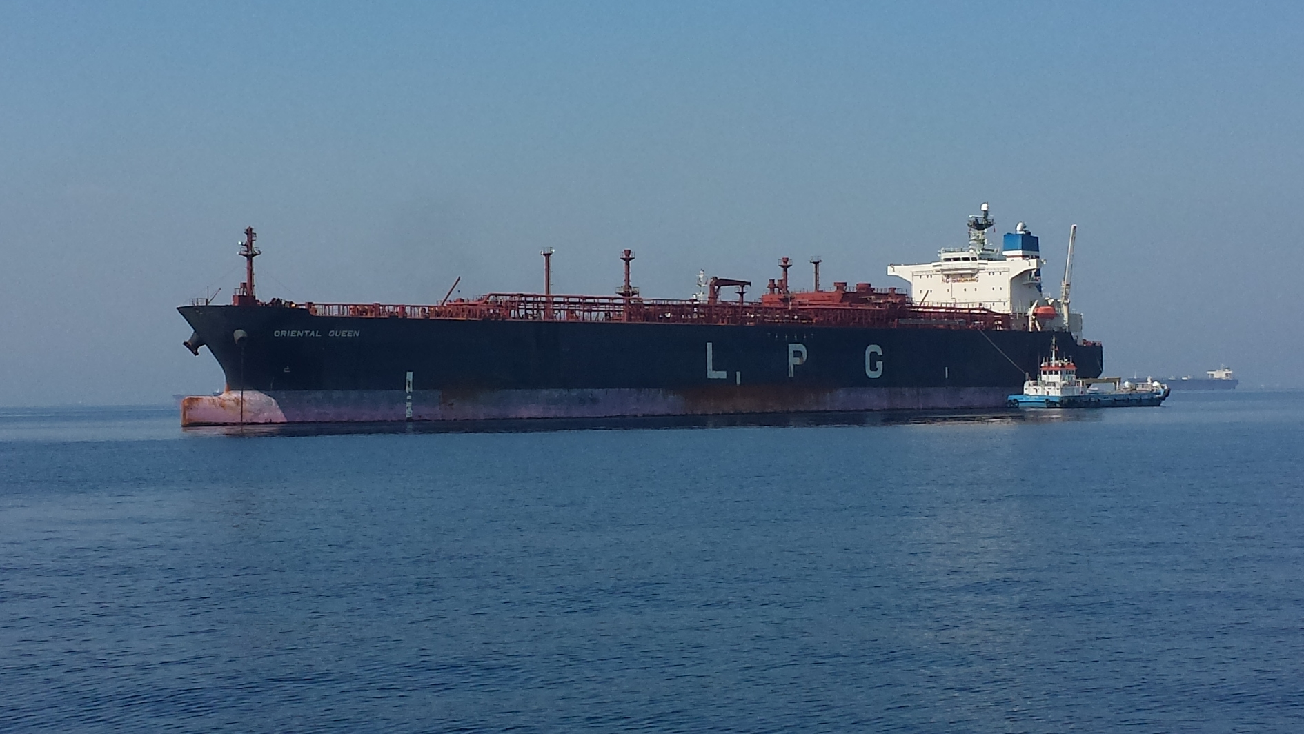 IMO 9282106 LPG Tanker